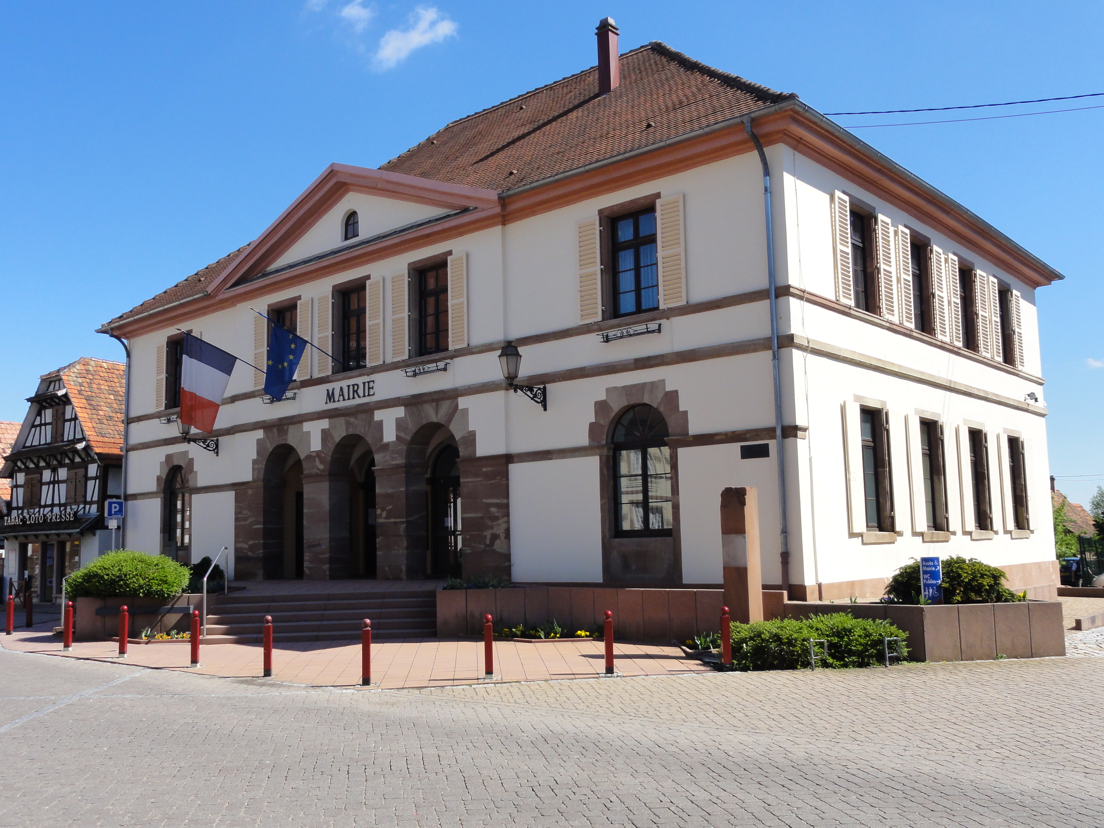 Alsace, Bas-Rhin, Weyersheim, Mairie (1835), 82 rue Baldung Grien: .